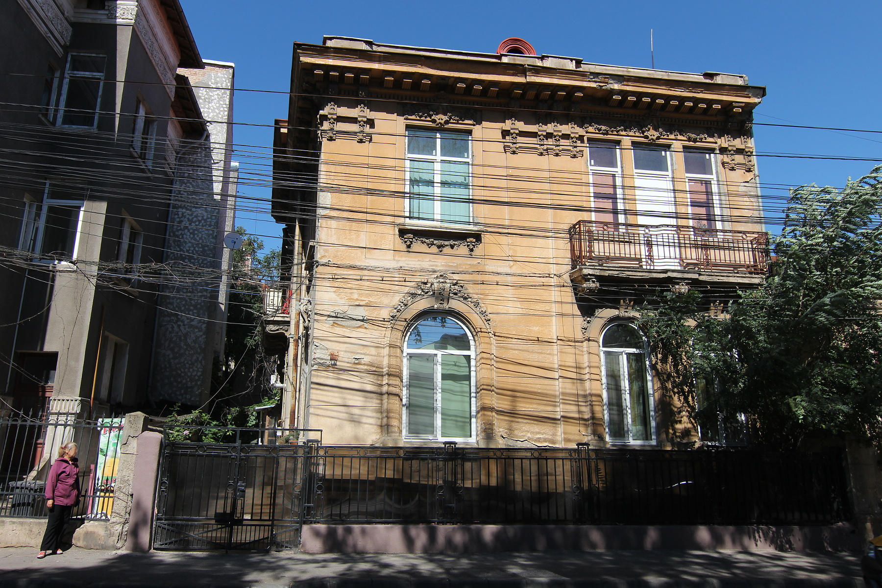 Imobil pe Calea Călărașilor